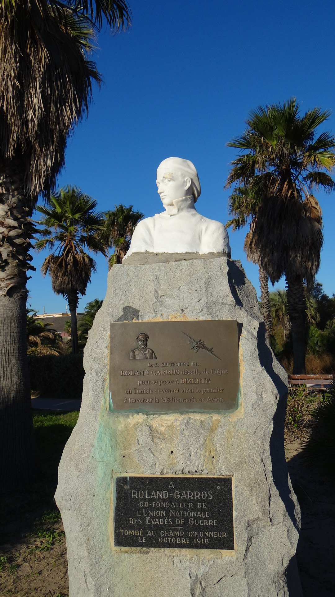 Base nature de Fréjus